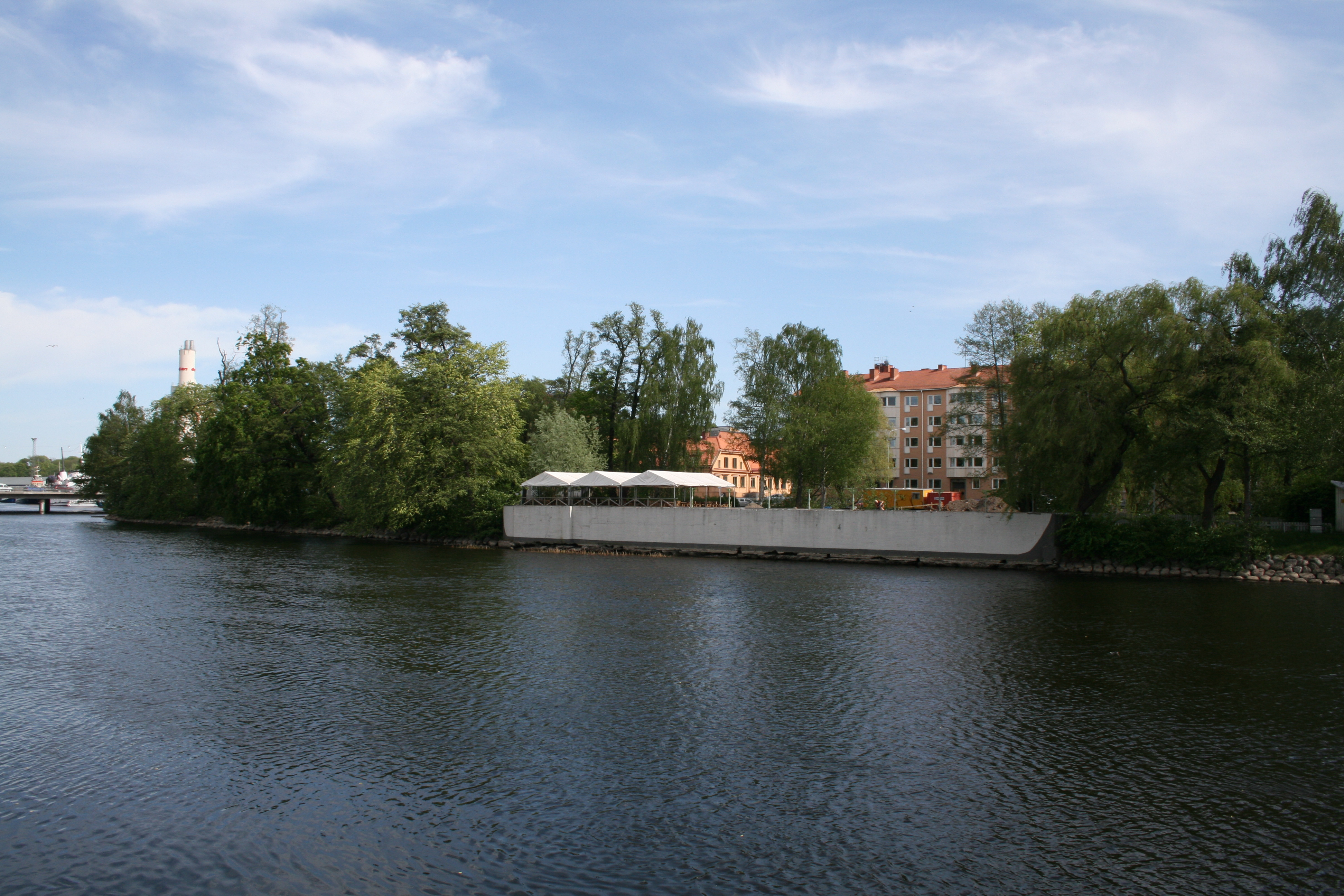 Strömsholmen i centrala Norrköping